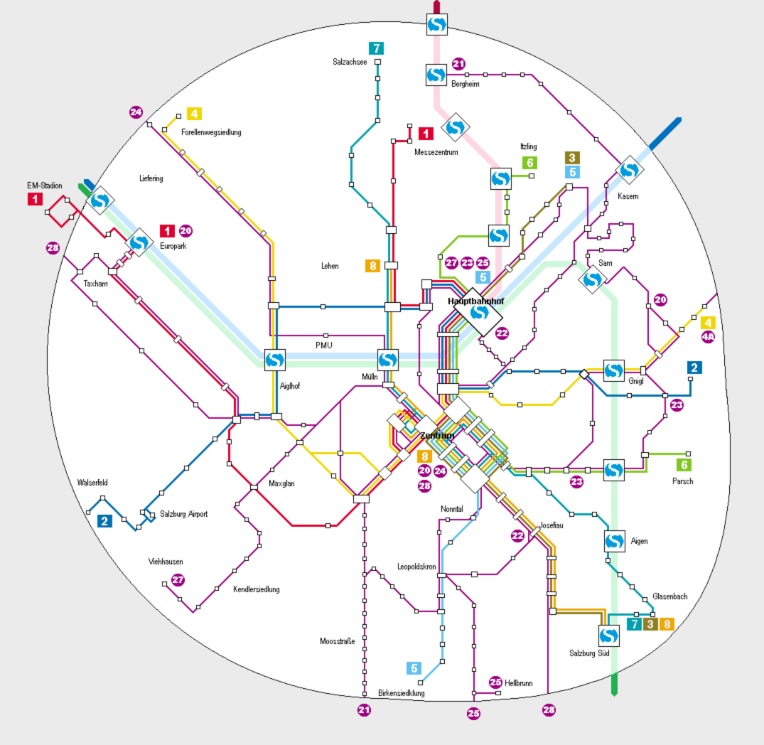 Zone 50100 des SVV (Salzburger Verkehrsverbund) mit S-Bahn, O-Bus, städtischen Autobussen Sonstiges: ...